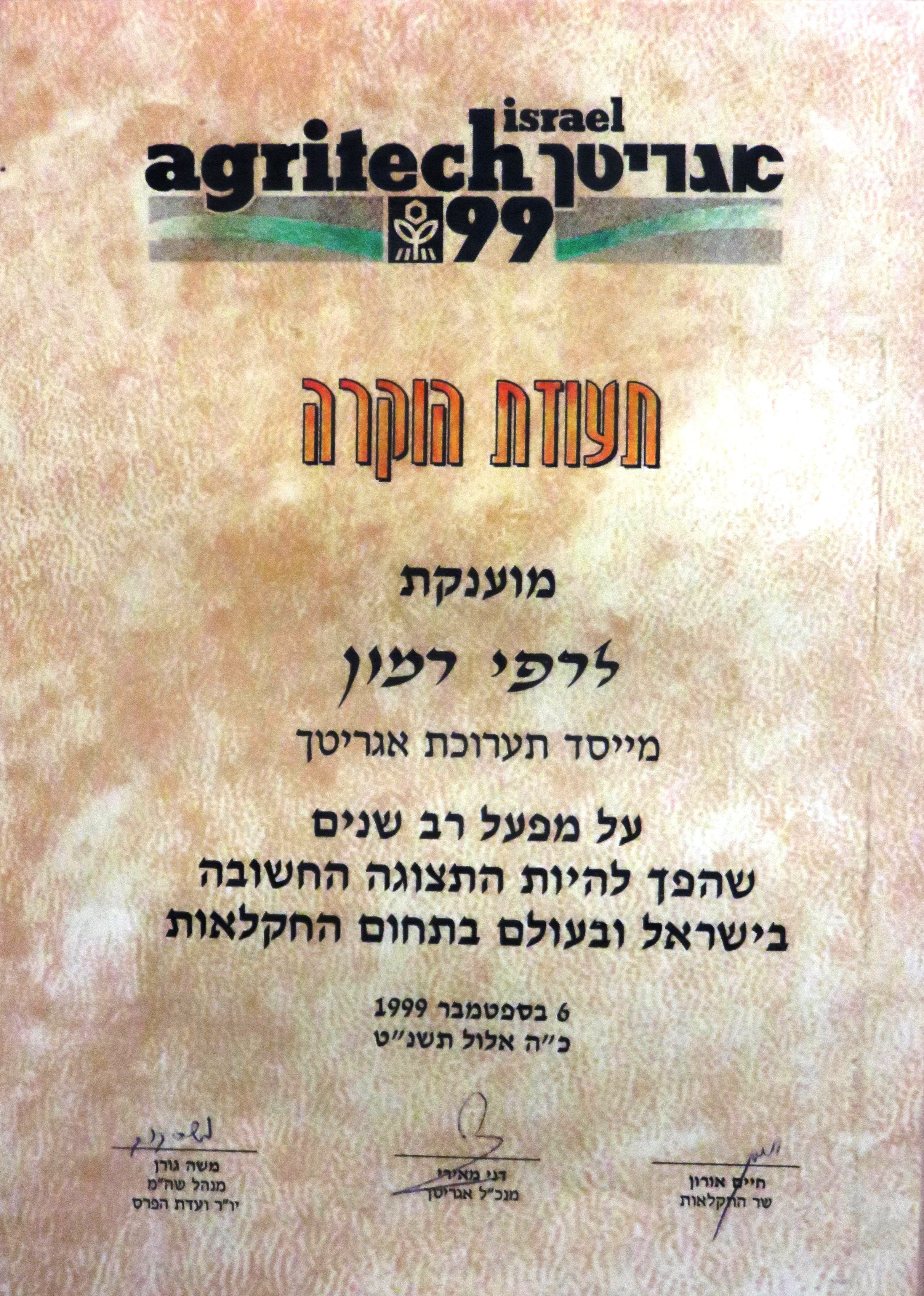 תעודה שהוענקה לרפי רמון שלוש שנים לאחר פרישתו מהתפקיד.